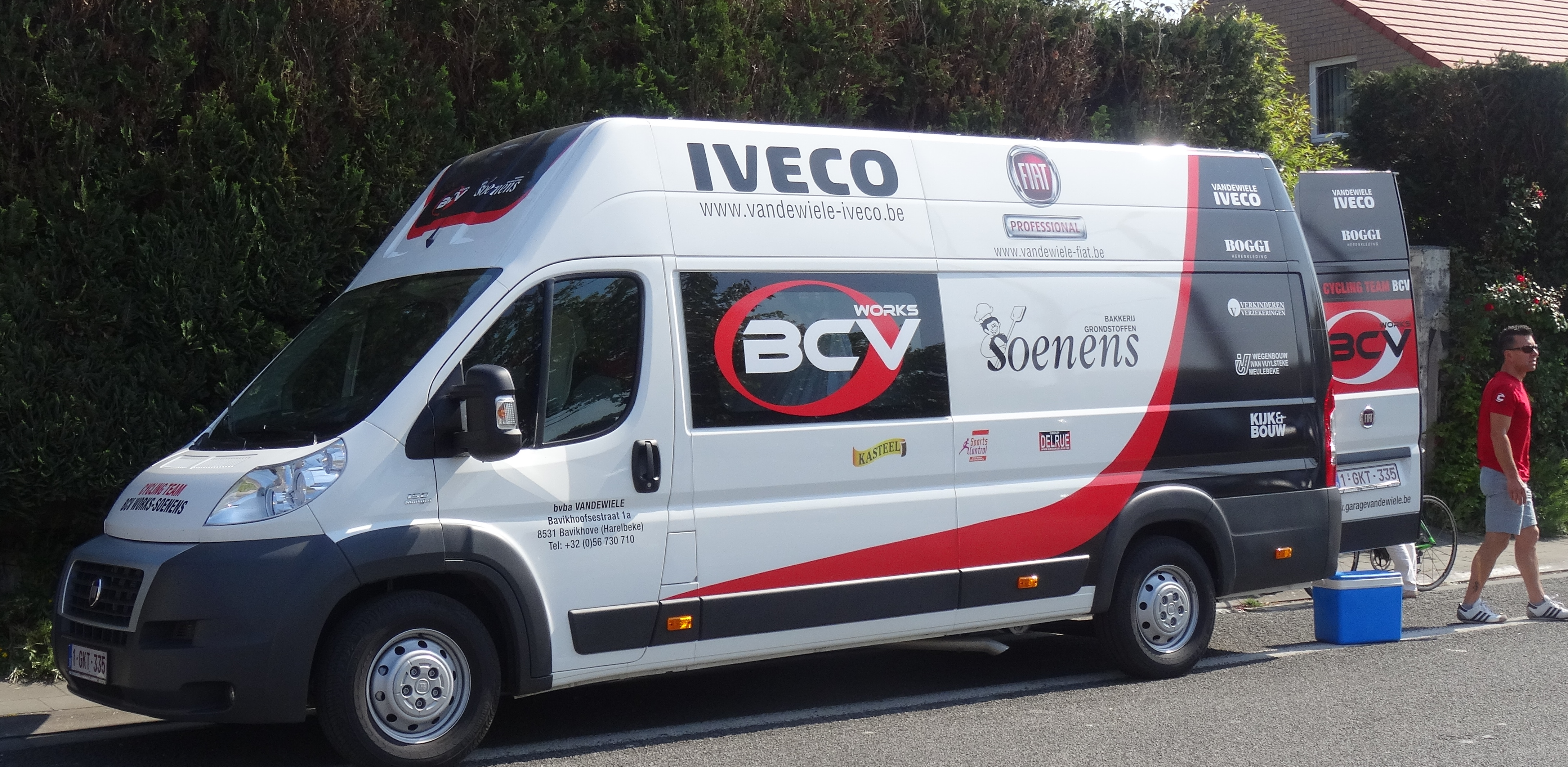 Reportage réalisé le samedi 17 mai à l'occasion du départ du Grand Prix Criquielion 2014 à Boussu, Belgique.